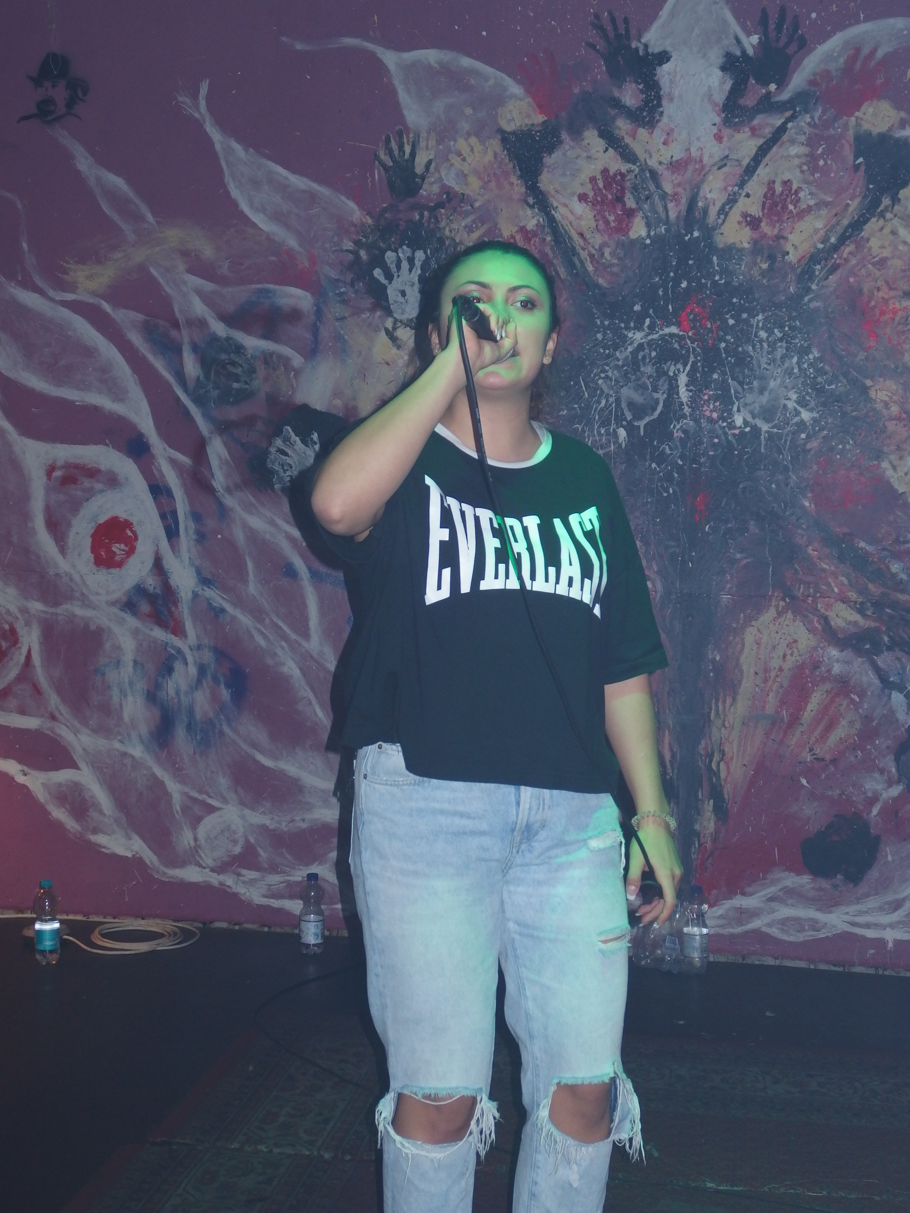 Haszcara live im St. Ingberter JUZ